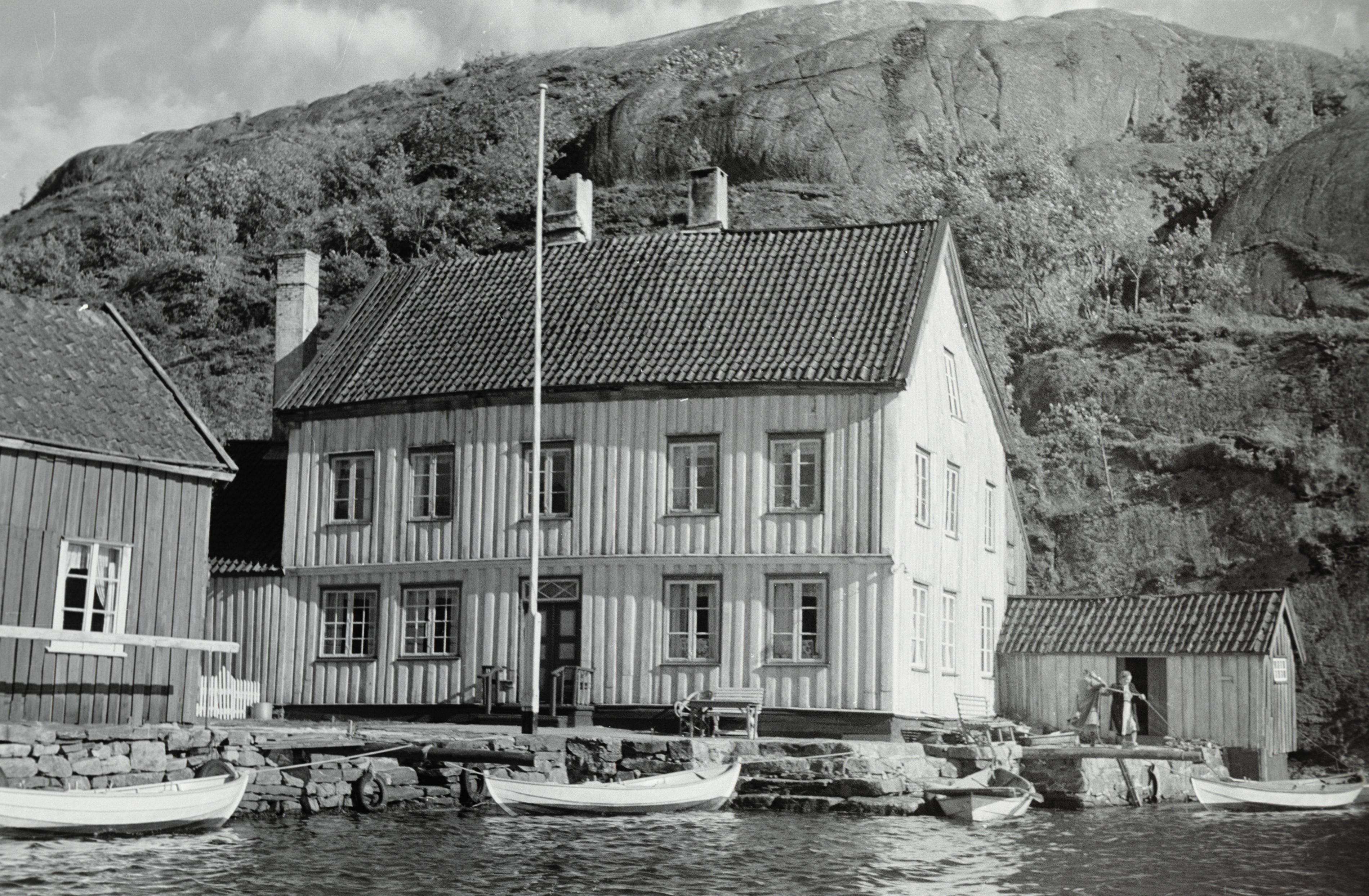 Langfeldts hus, Monsøen, Ny Hellesund i Søgne, Vest-Agder This image on crowdsourcing geotagging platform Fotodugnad